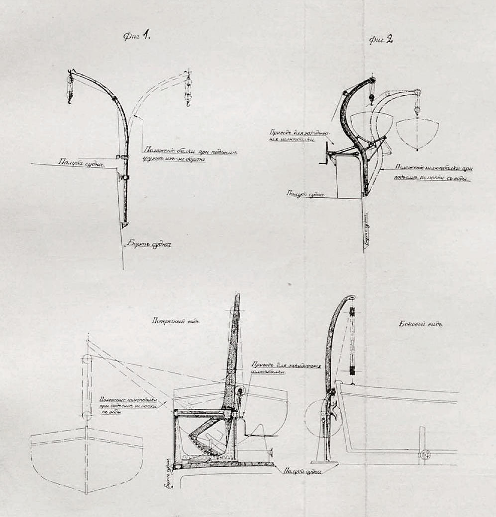 Данное изображение было использовано в статье «Балка» опубликованной в четвёртом томе «Военной энциклопедии», который был издан книгоиздательским товариществом Ивана Дмитриевича Сытина в 1911 году в столице Российской империи городе Санкт-Петербурге.